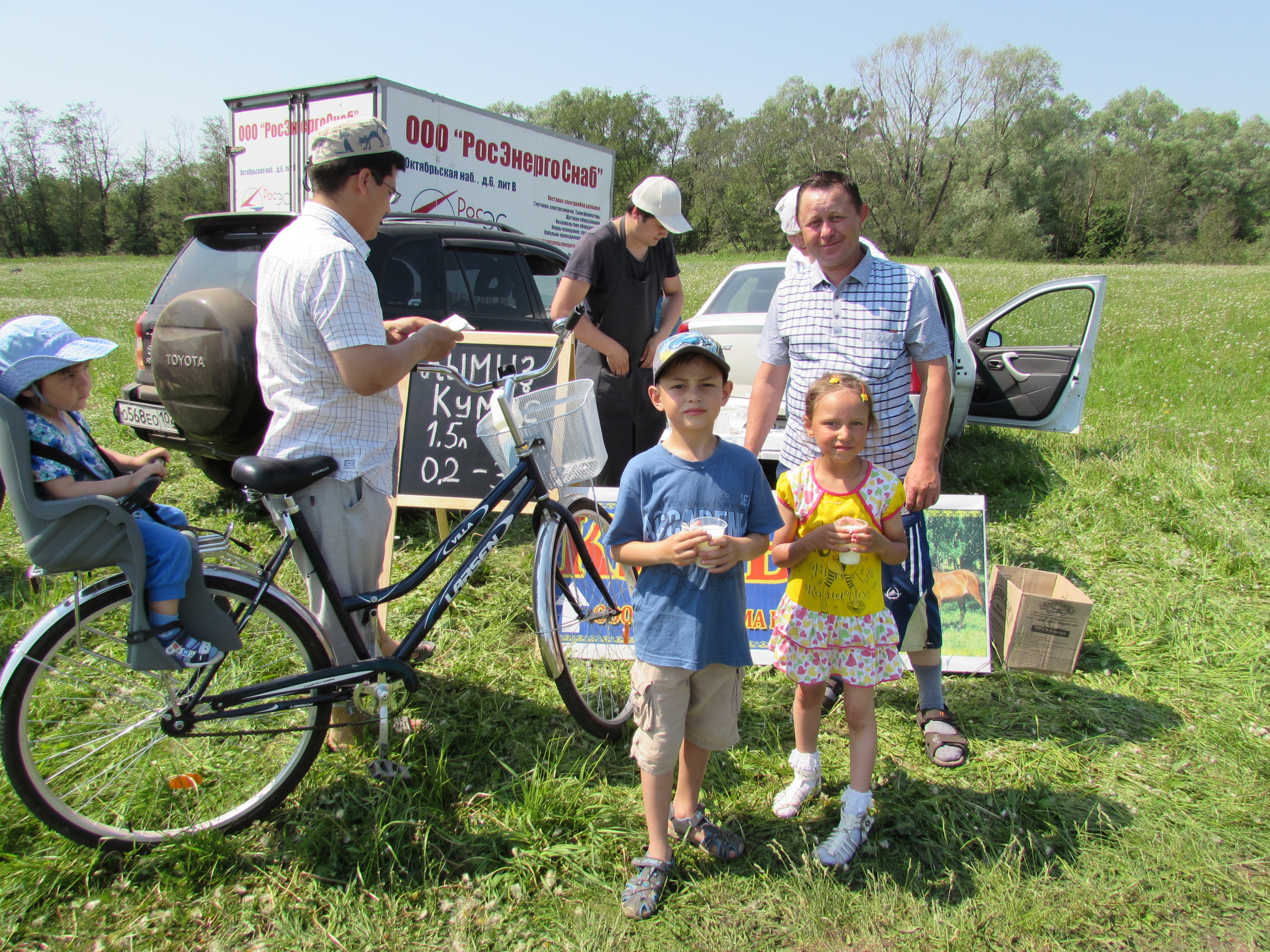 Башҡортса: Шамонин ауылы һабантуйы